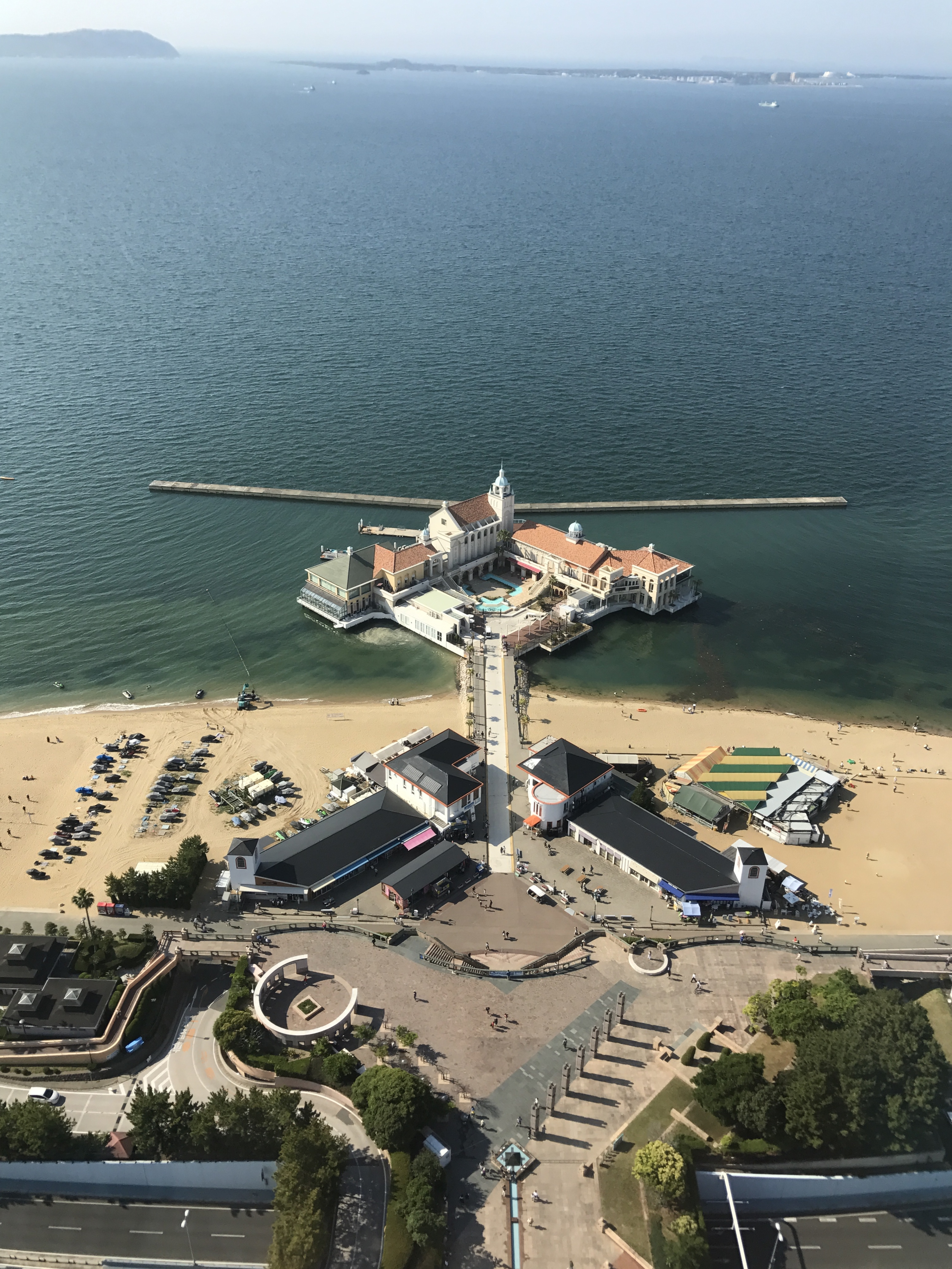 福岡タワーより望むマリゾン